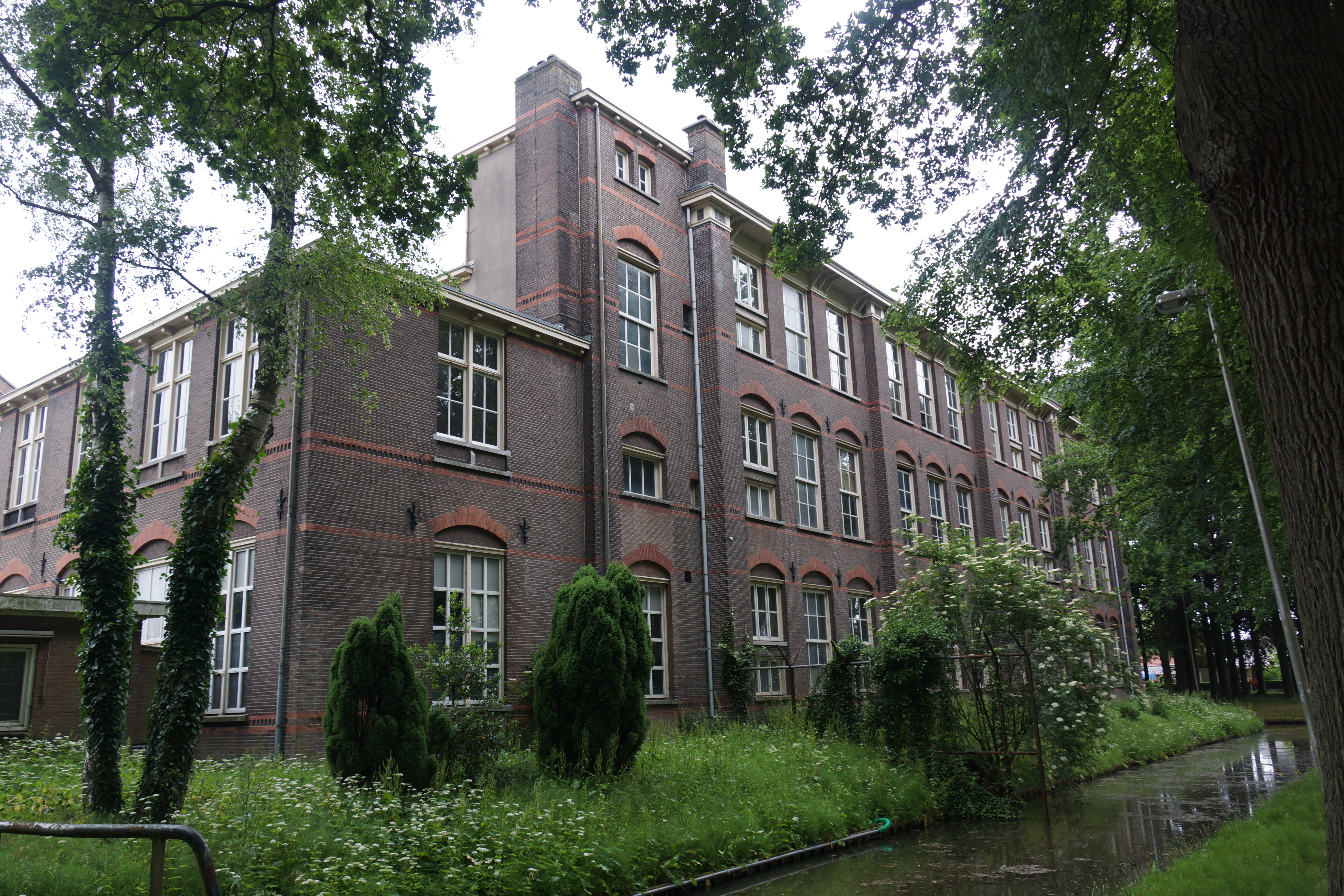 Kruisberg Doetinchem verblijfsgebouw 'De flat' uit 1899 150614 (14)